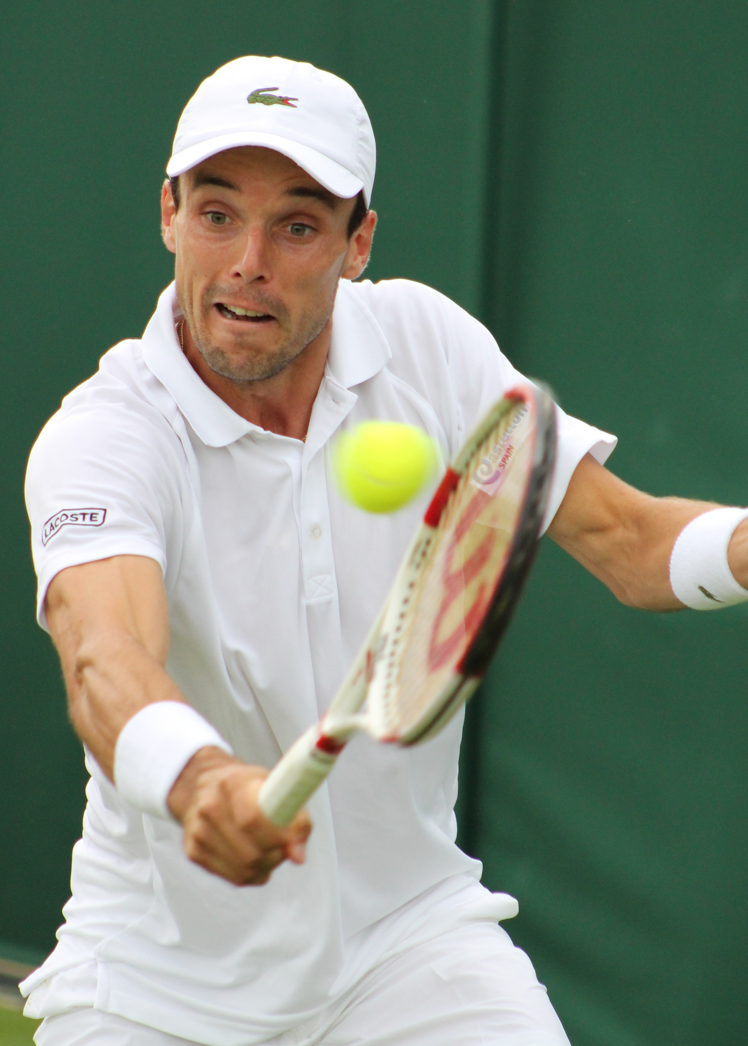 Bautista Agut WM14 (19)